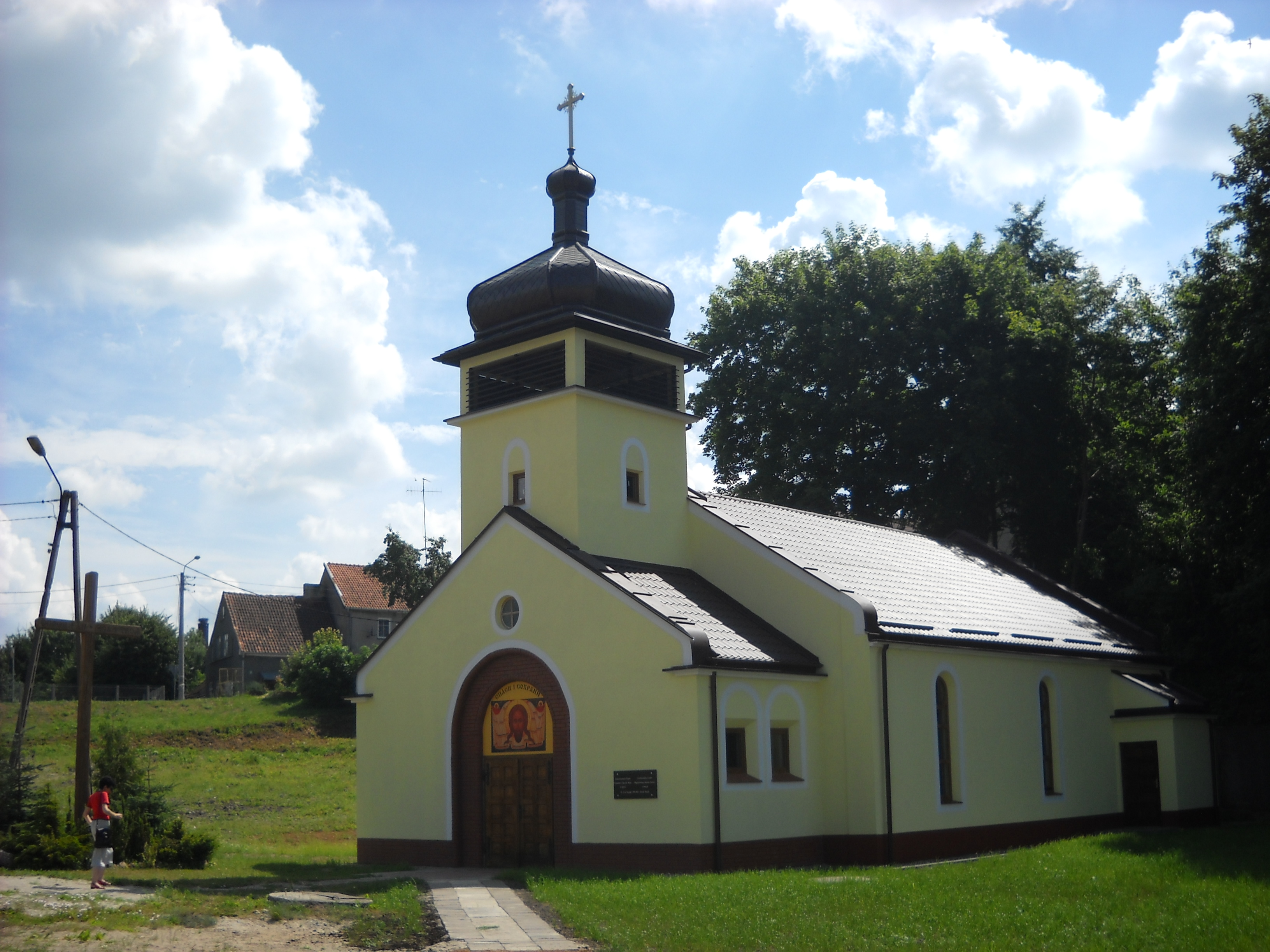 Cerkiew greckokatolicka w Ornecie